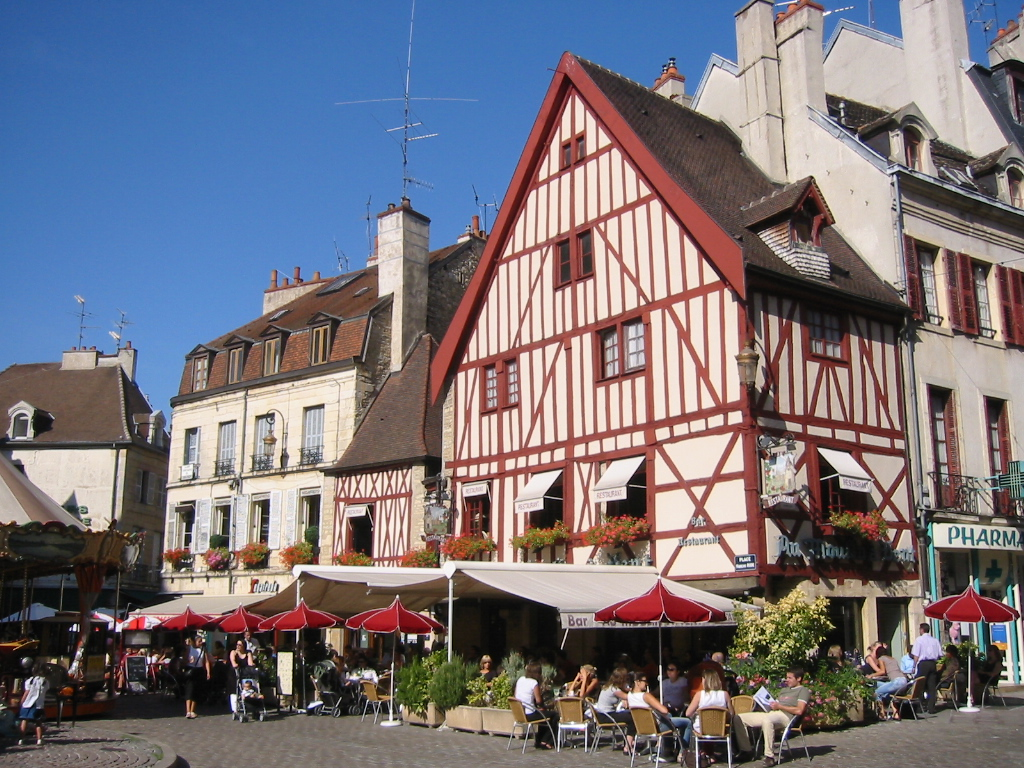 Place Francois Rude à Dijon, France aussi appelée "place du bareuzai" en raison de la statue représentant un vigneron en train de presser le raisin avec ses pieds et portant un bareuzai ("bas rosé" en Bourguignon-morvandiau).